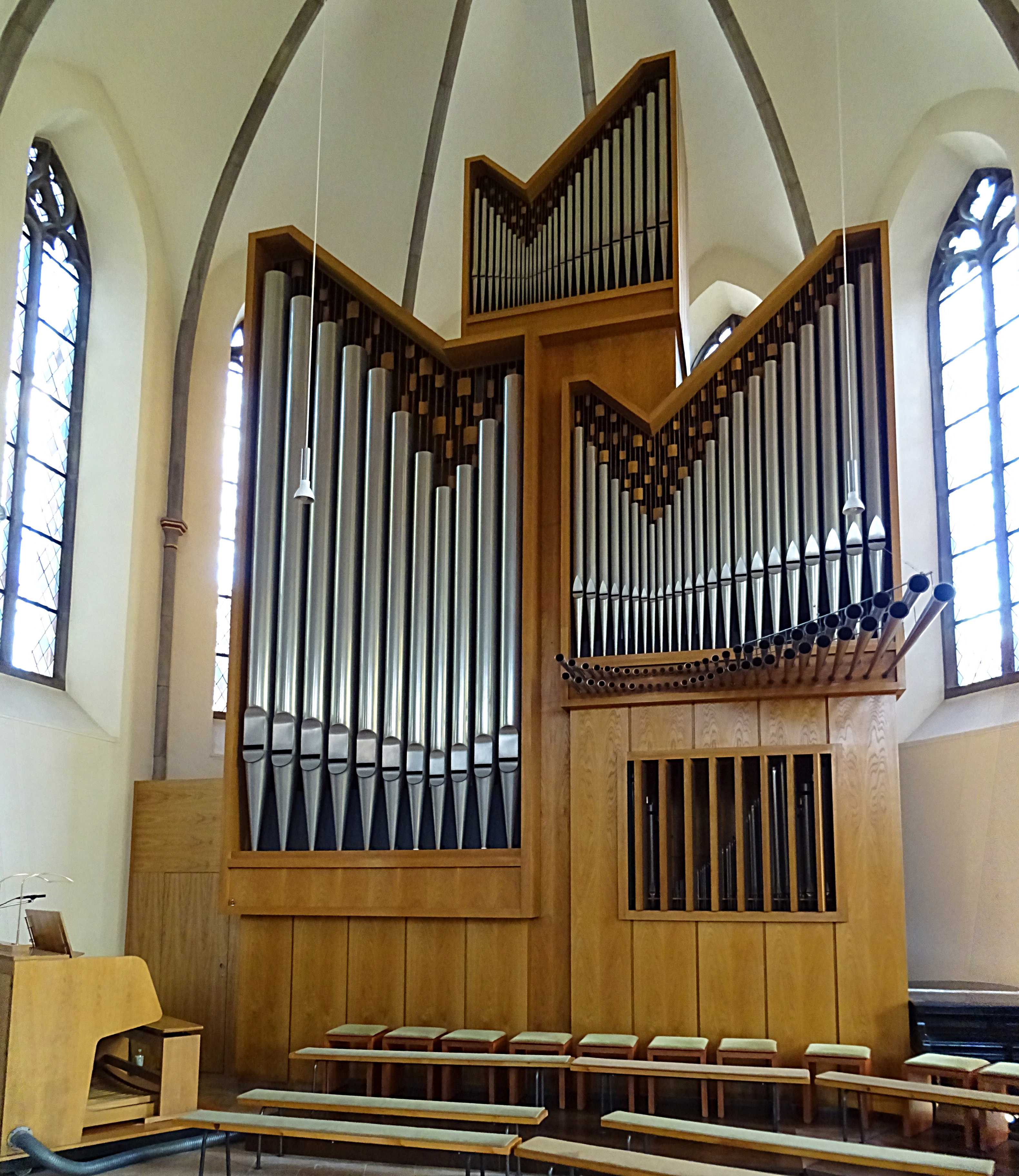 Jemlich-Orgel (1981, Opus 1018, IIIP/35) in der Pfarrkirche St. Josef (Mühlhausen)